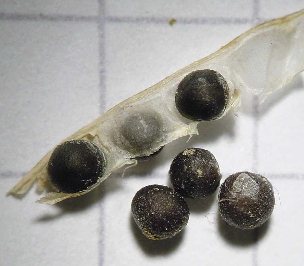 Sinapis arvensis, seeds, Samen